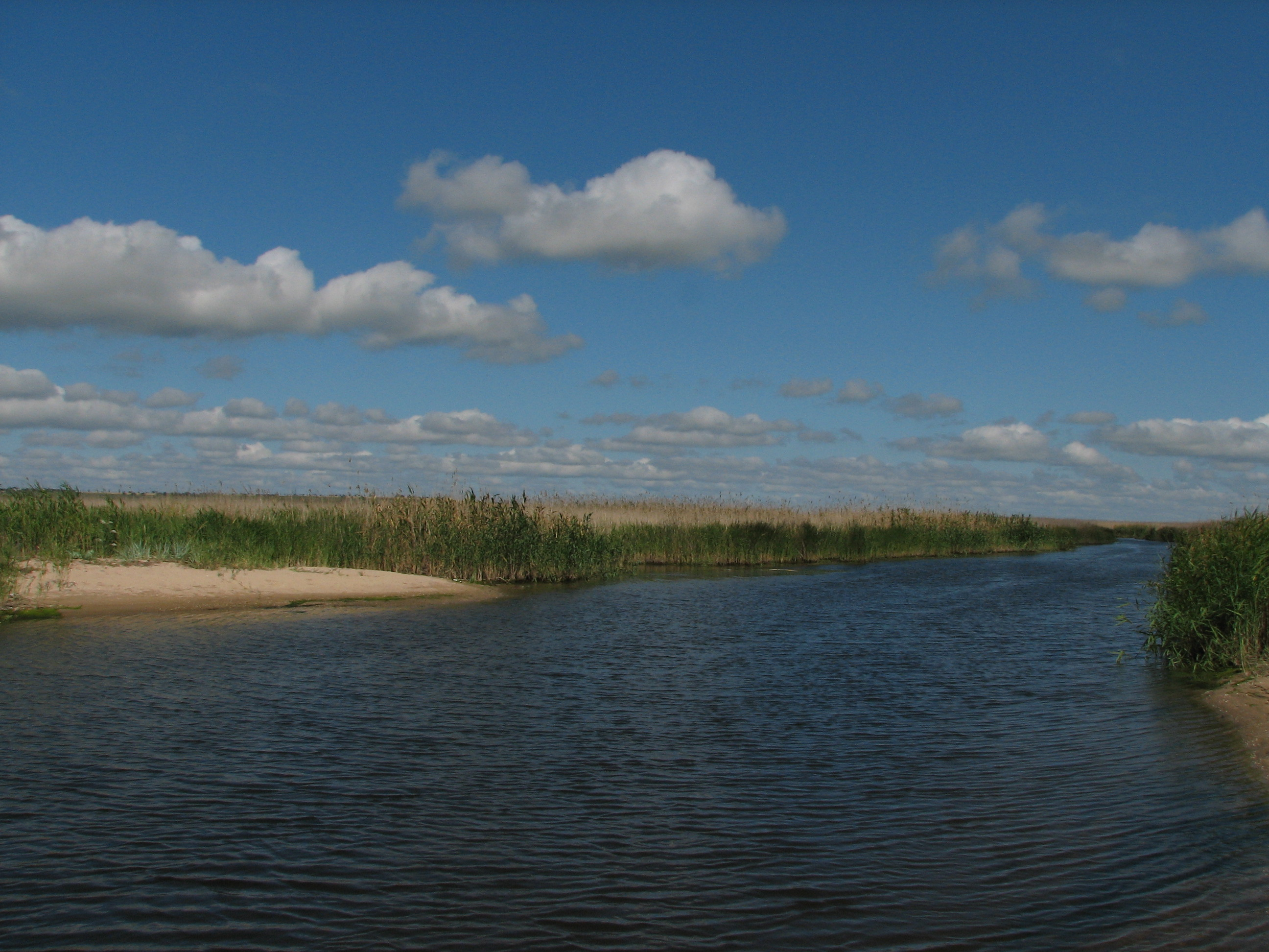 Снимок сделан в устье реки Берда. На основании этого снимка и снимков с таким же именем (Устье реки Берда (панорама)) можно склеить круговую панораму.